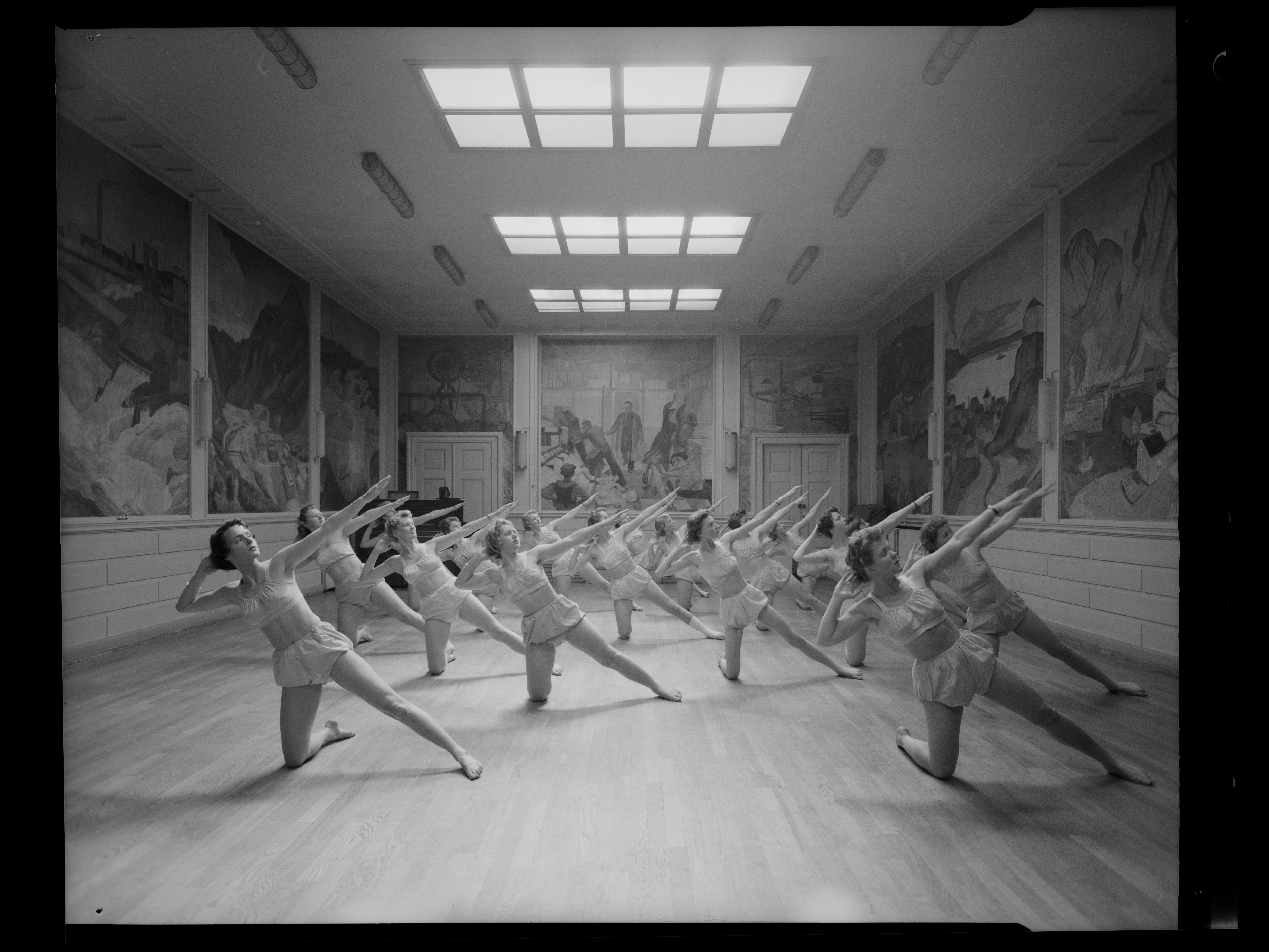 Bildet er hentet fra Nasjonalbibliotekets bildesamling. Anmerkninger til bildet var: Fotograf : T.F.D Oslo, Oslo, Oslo